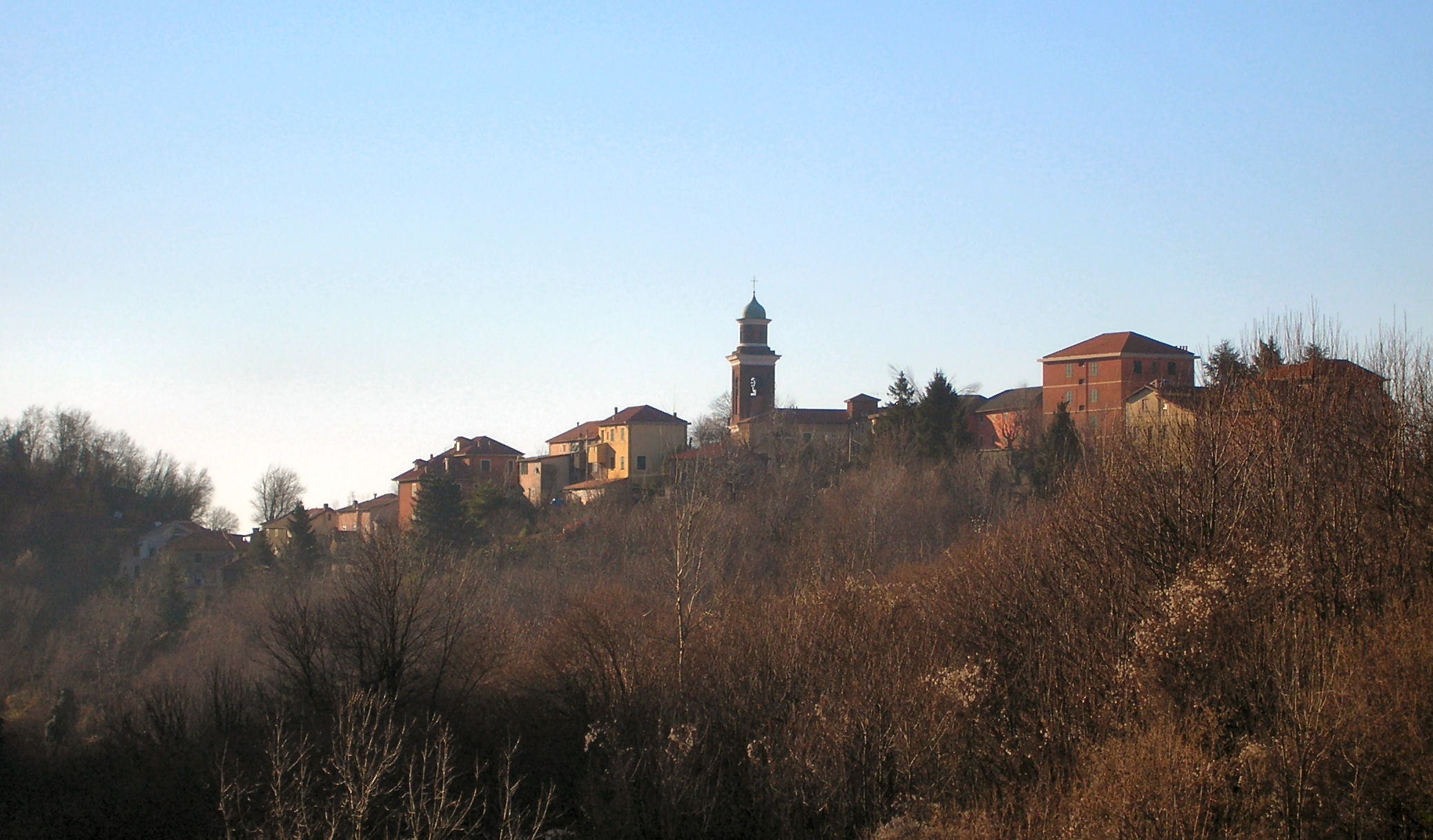 Mignanego (Genova) Il santuario della Vittoria Foto propria Dicembre 2008 Licensing Categoria:Chiese di Mignanego